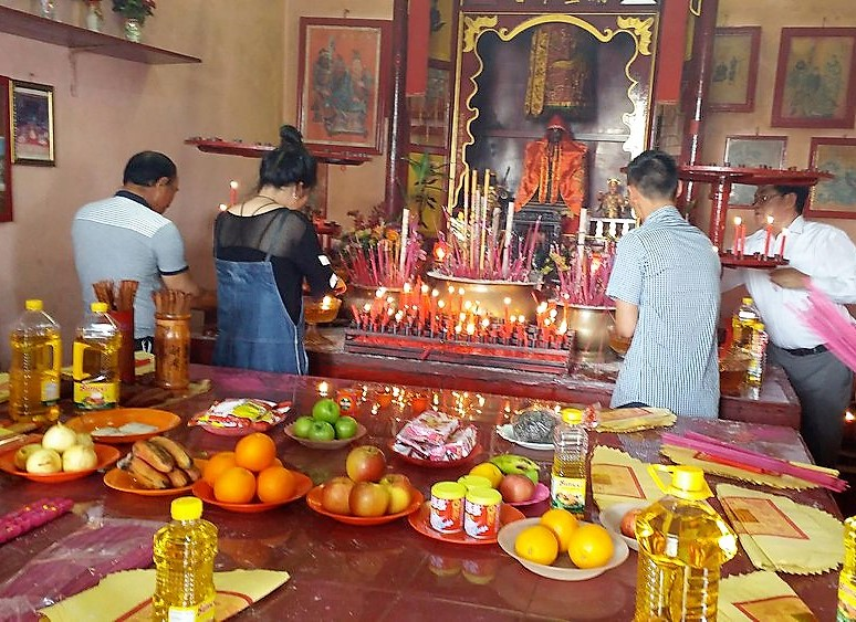 Chinesisches Neujahr, chinesischer Tempel in Dili, Osttimor